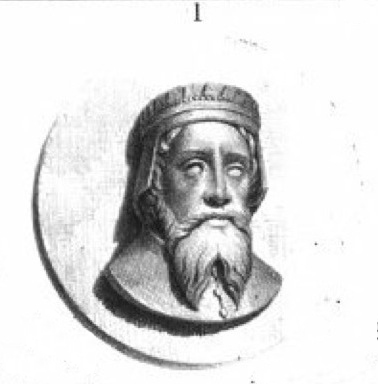 Album du Dauphiné - tome IV, litographie des Dauphins : 1. Guigues I